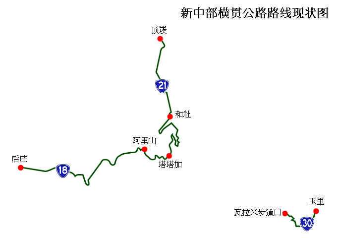 新中部横贯公路路线现状图。